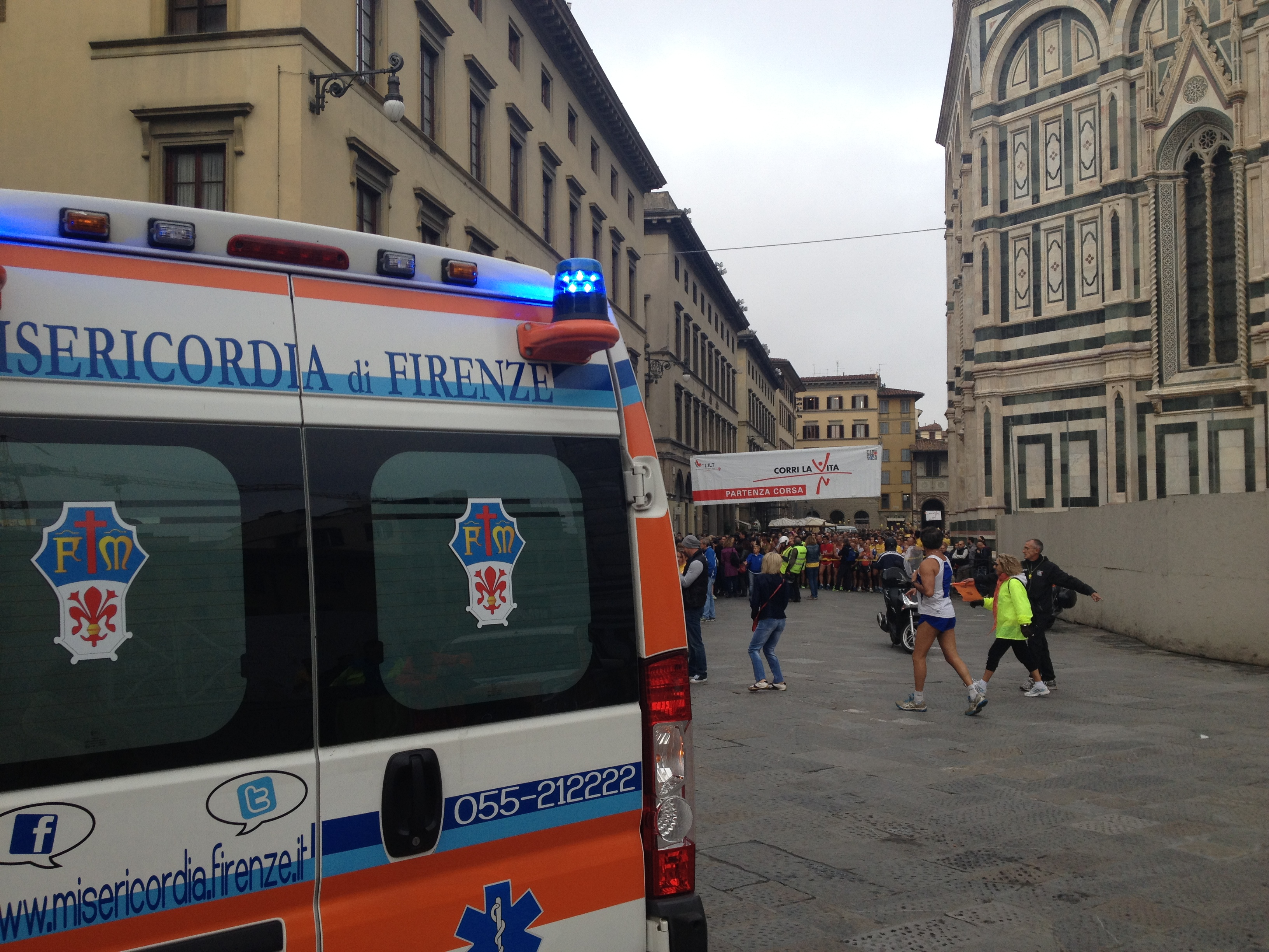 AMBULANZA DISLOCATA IN SEDE DUOMO